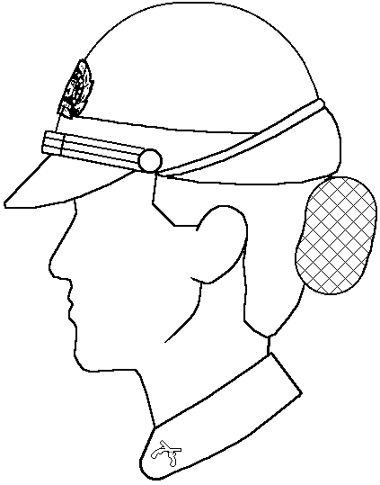 Perfil PF PMPR.